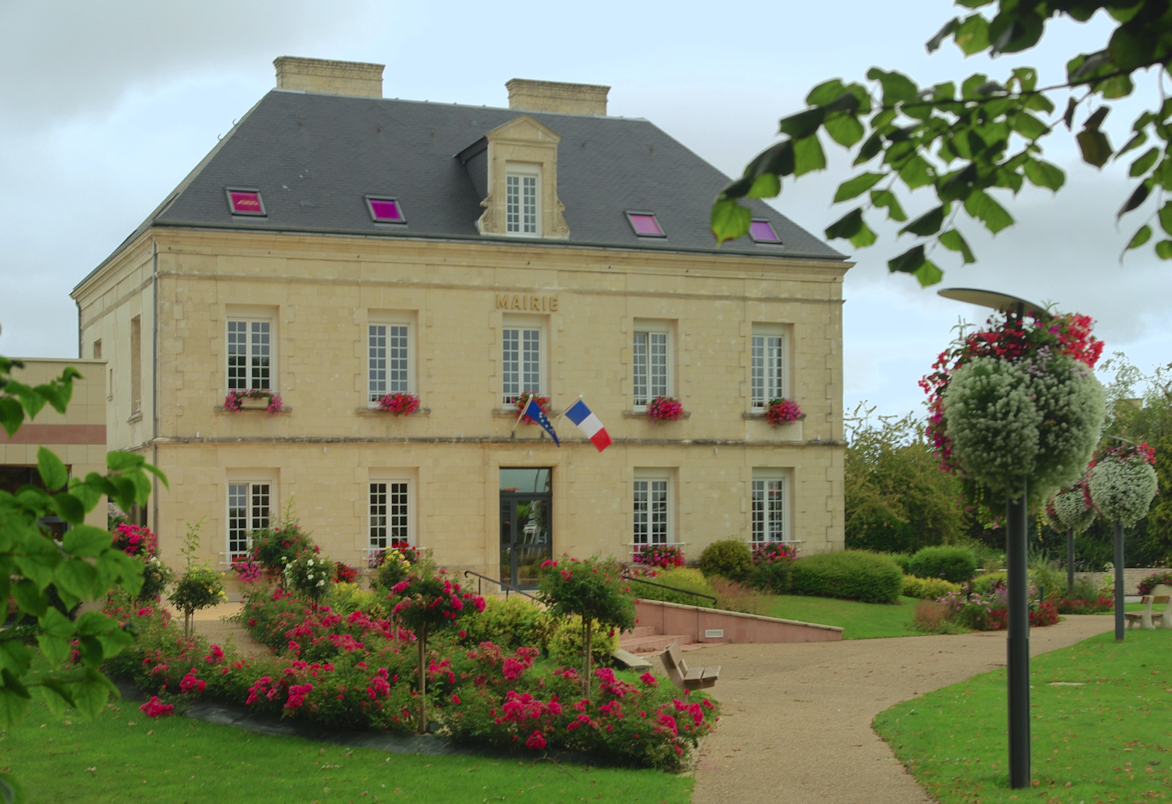 La mairie de Carpiquet.